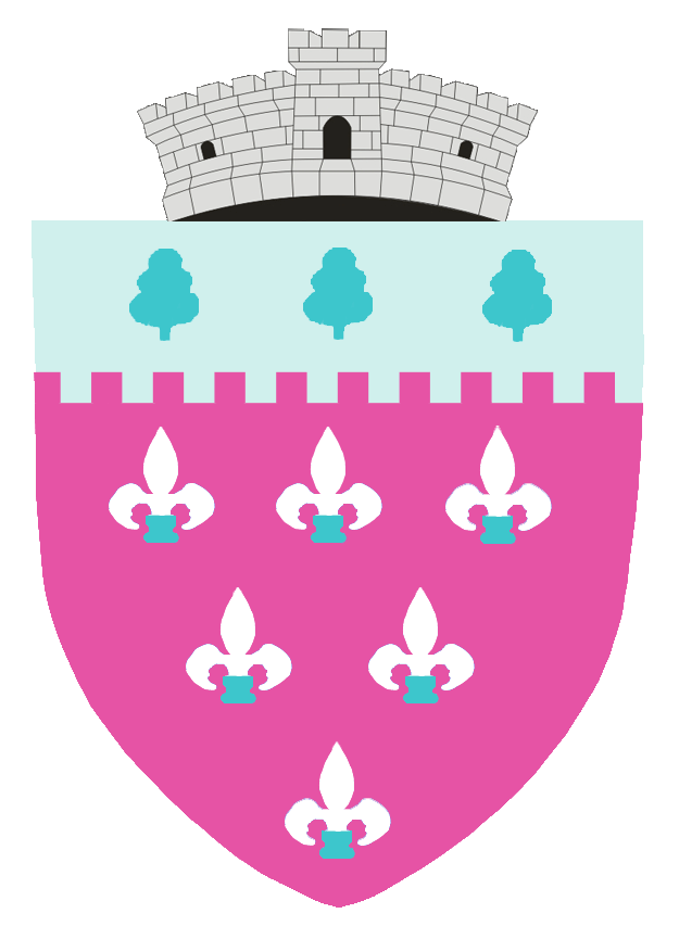 Stema comunei Trușești - creată în photoshop